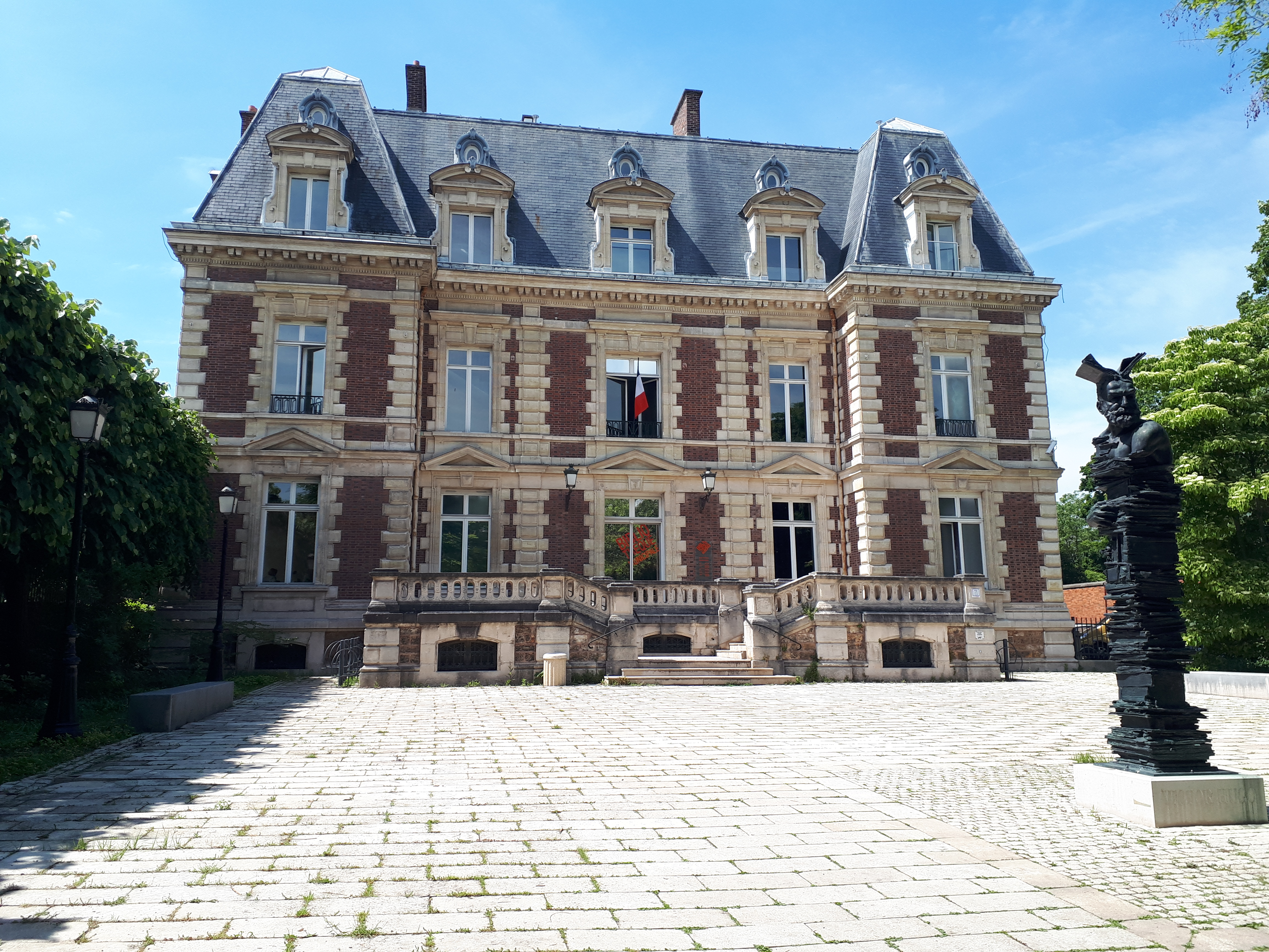 L'esplana de la bibliothèque municipale principale de Courbevoie.